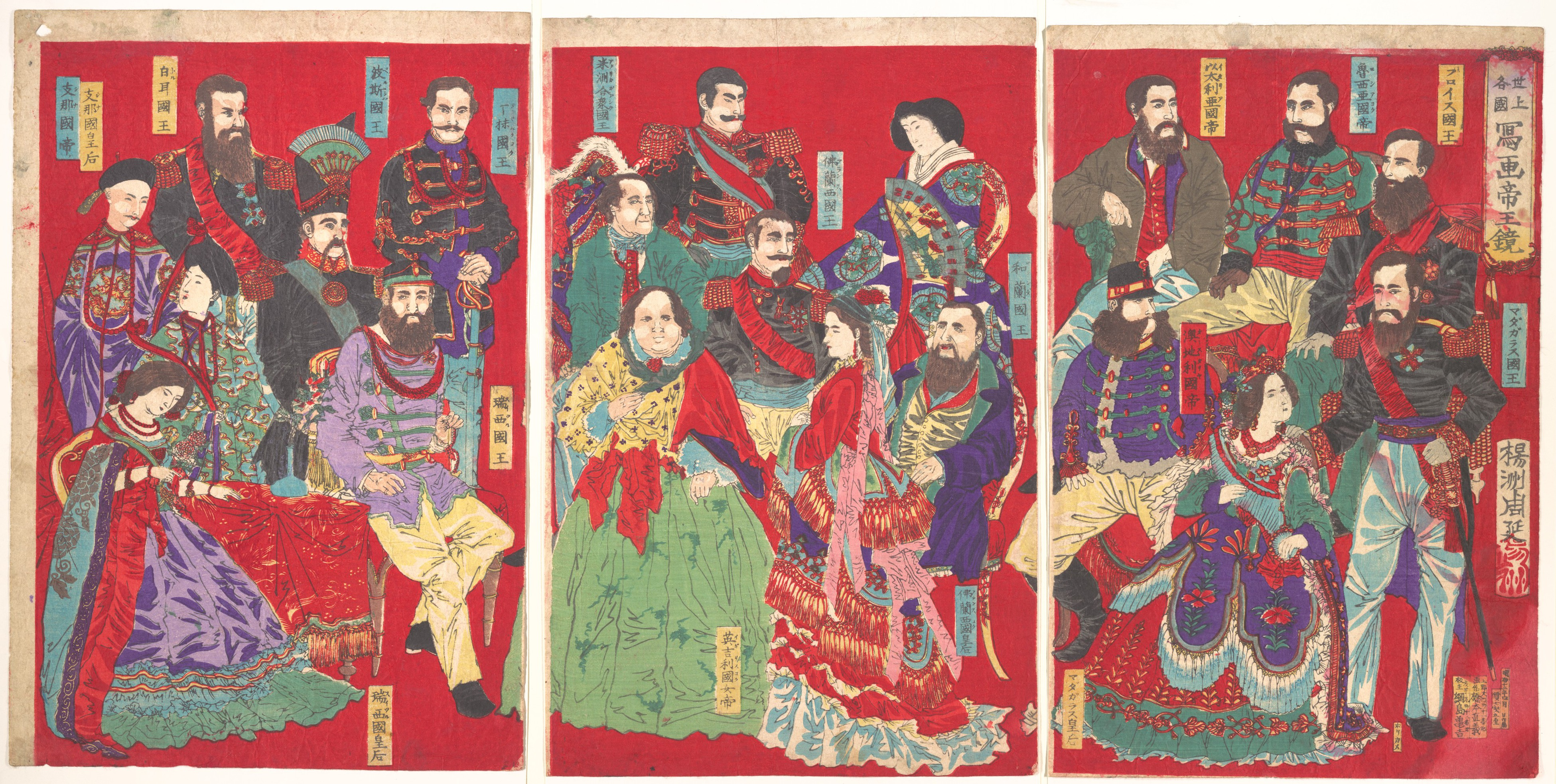 Japan; Print; Prints